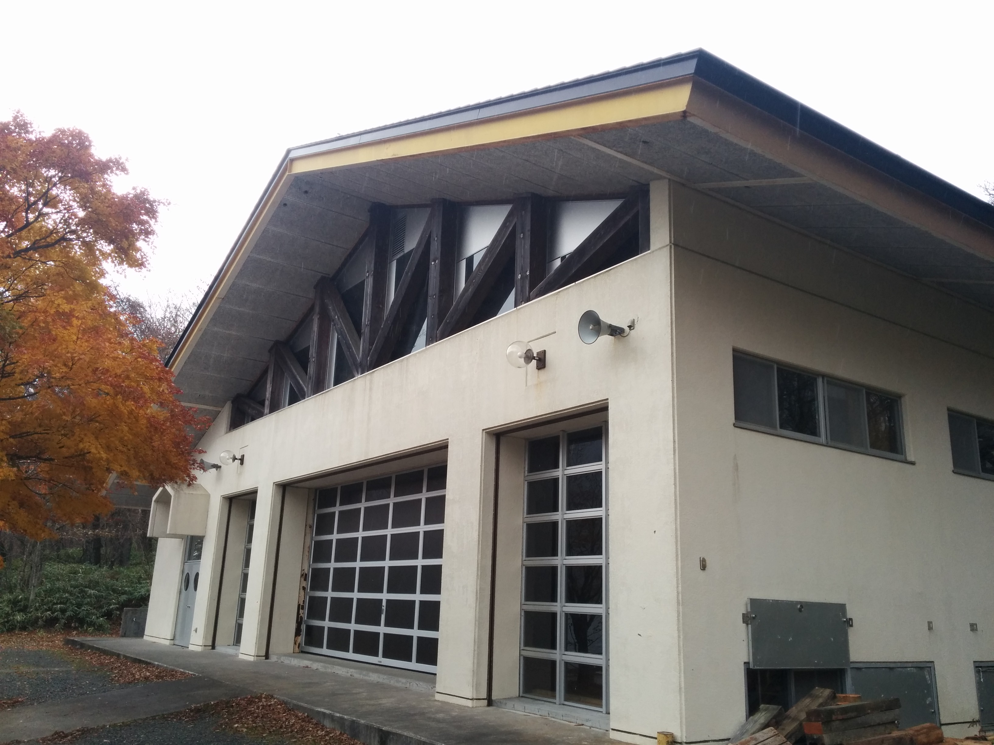 Wikidata Q28693234 's gymnasium